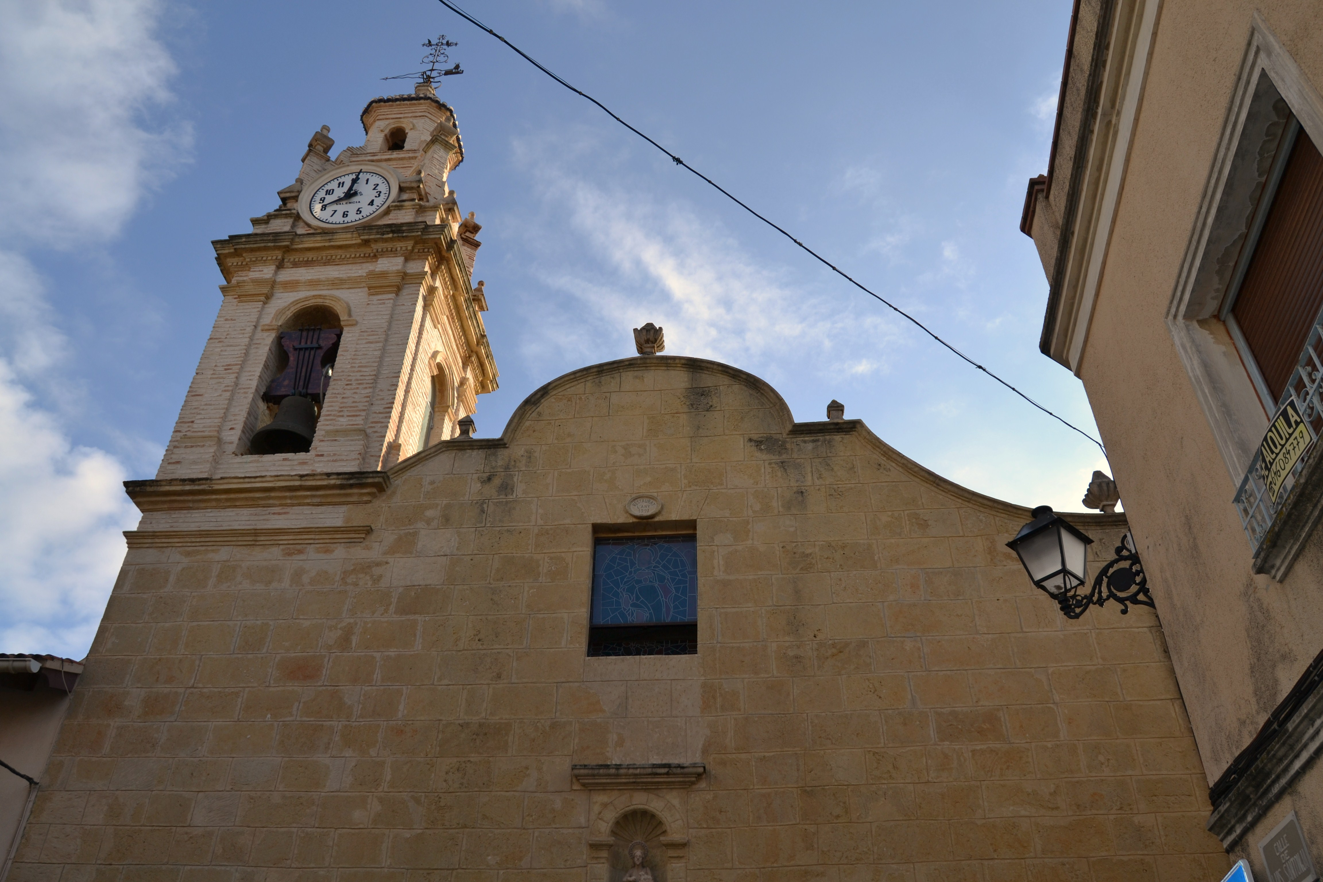 Església de sant Joan Baptista, Beniarbeig. 30.026-001.